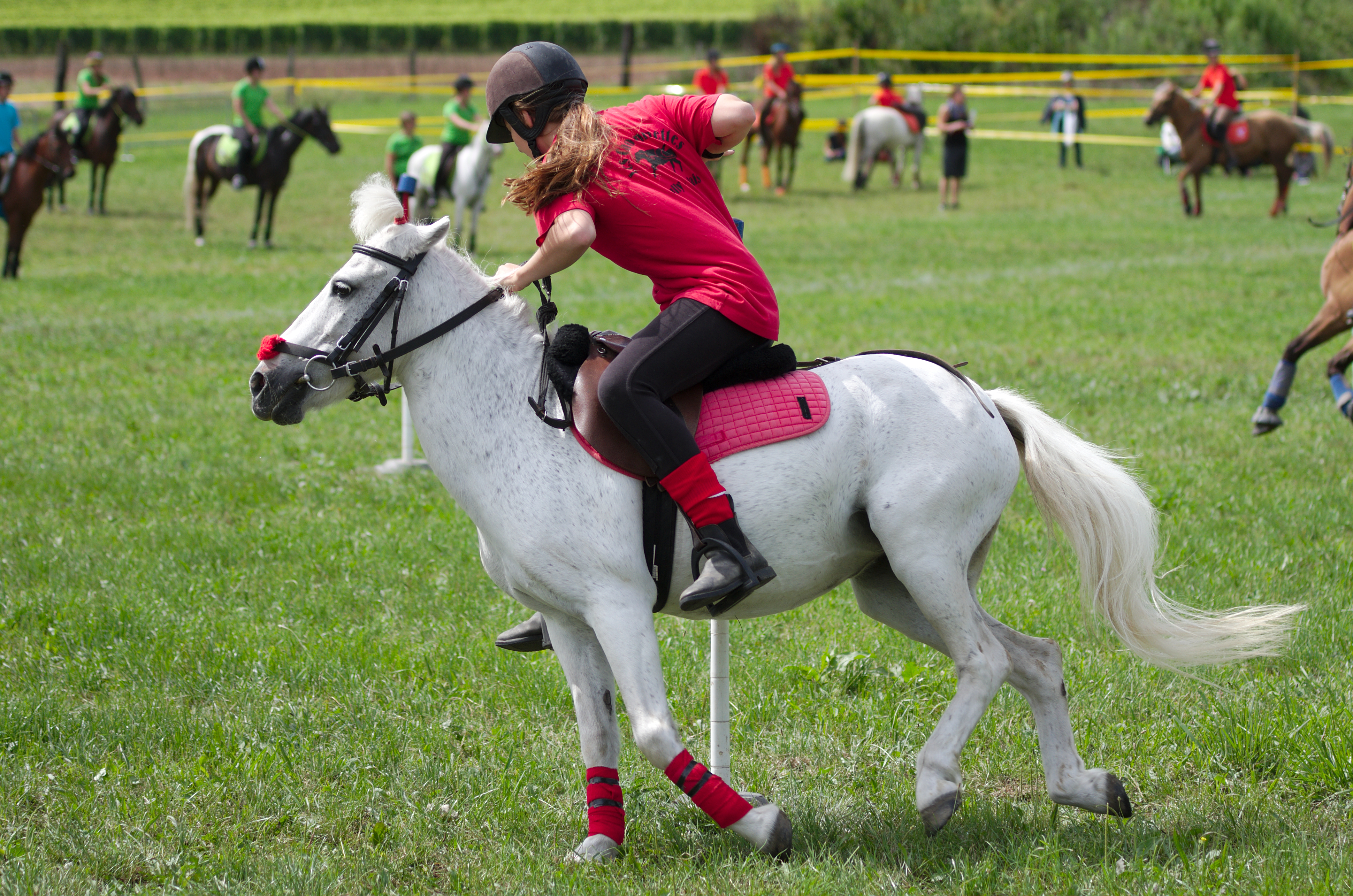 4ème manche du championnat suisse de Pony games 2013 - Laconnex